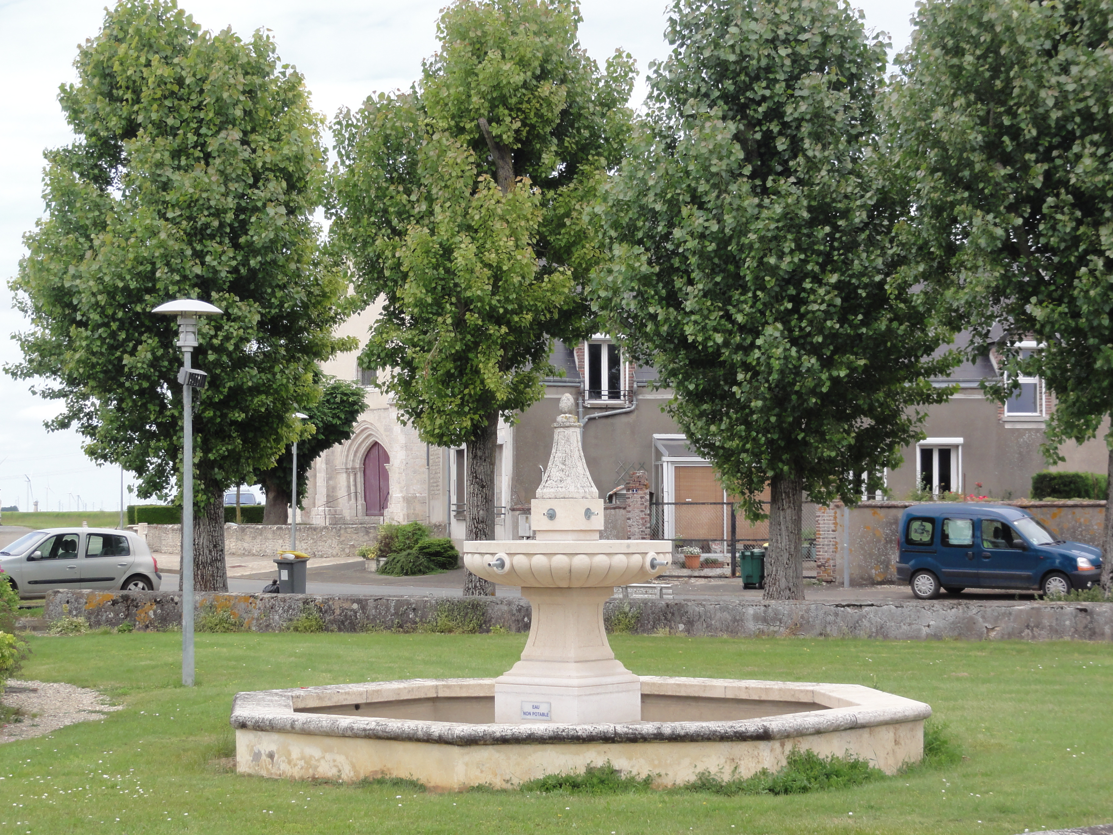 Dambron (Eure-et-Loir) Fontaine